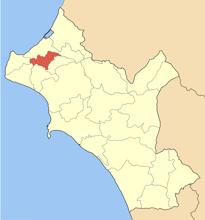 Locator map of Andravida municipality (Δήμος Ανδραβίδας) in Elis perfecture (Νομός Ηλείας) in Greece.